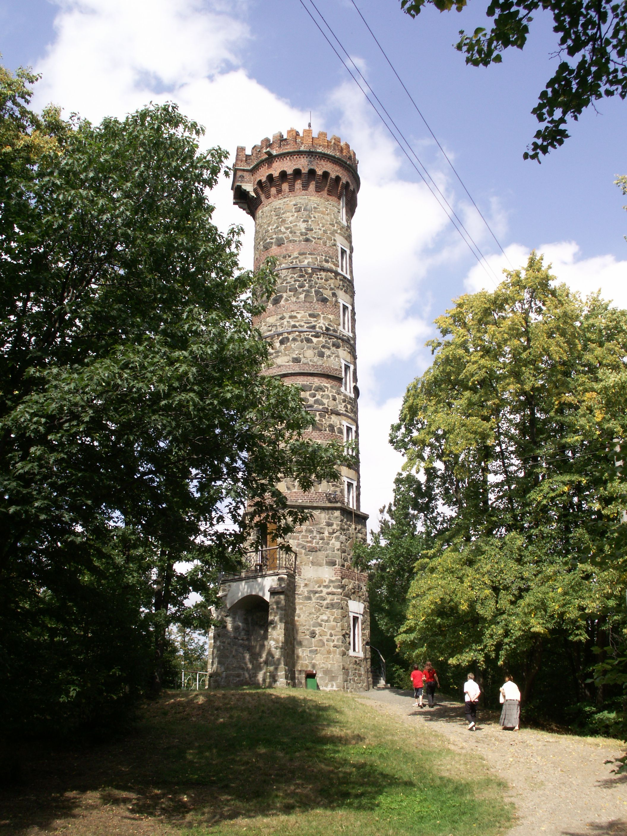 Rozhledna Cvilín u Krnova, okres Bruntál